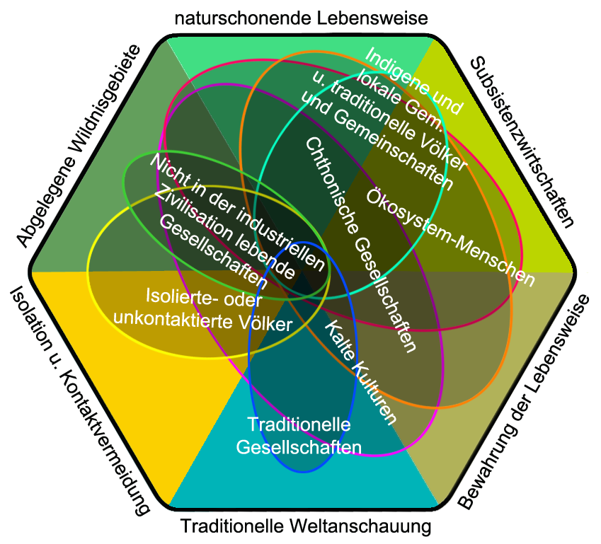 Veranschaulichung der Schwerpunkt-Überschneidungen verschiedener Bezeichnungen für nicht-industrialisierte Menschengruppen abgelegener Regionen; früher irreführend „Naturvölker“ genannt